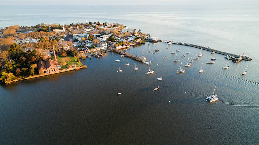 Яхтенный порт в Колония-дель-Сакраменто